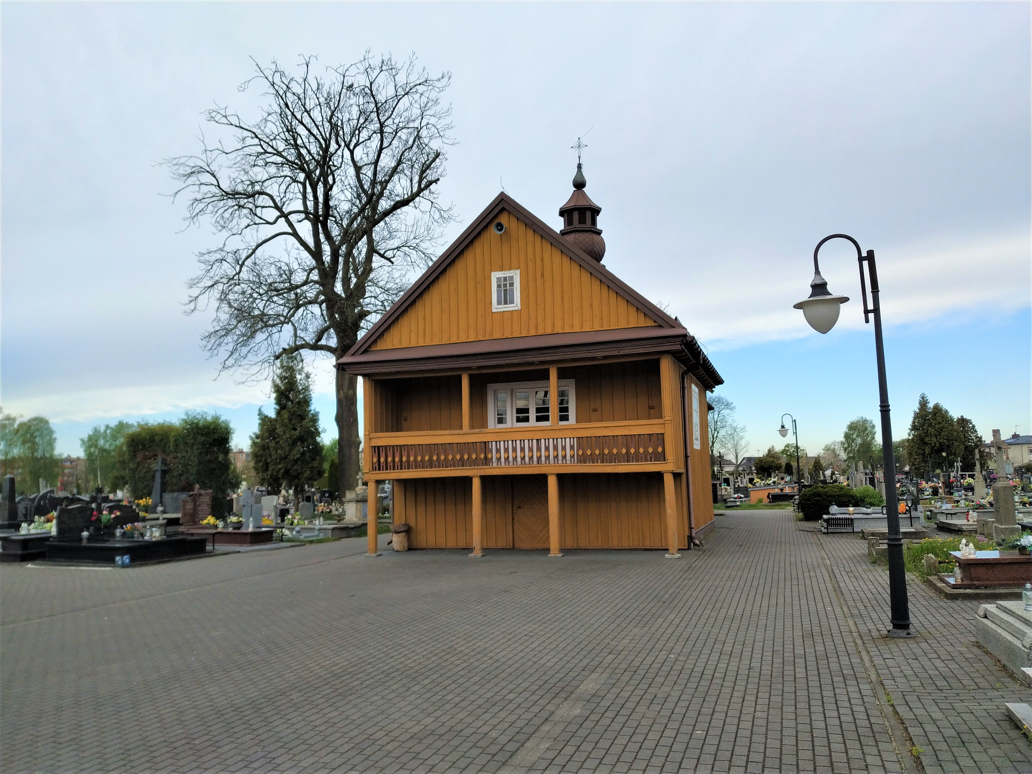 Kościół filialny św. Rocha w Łukowie